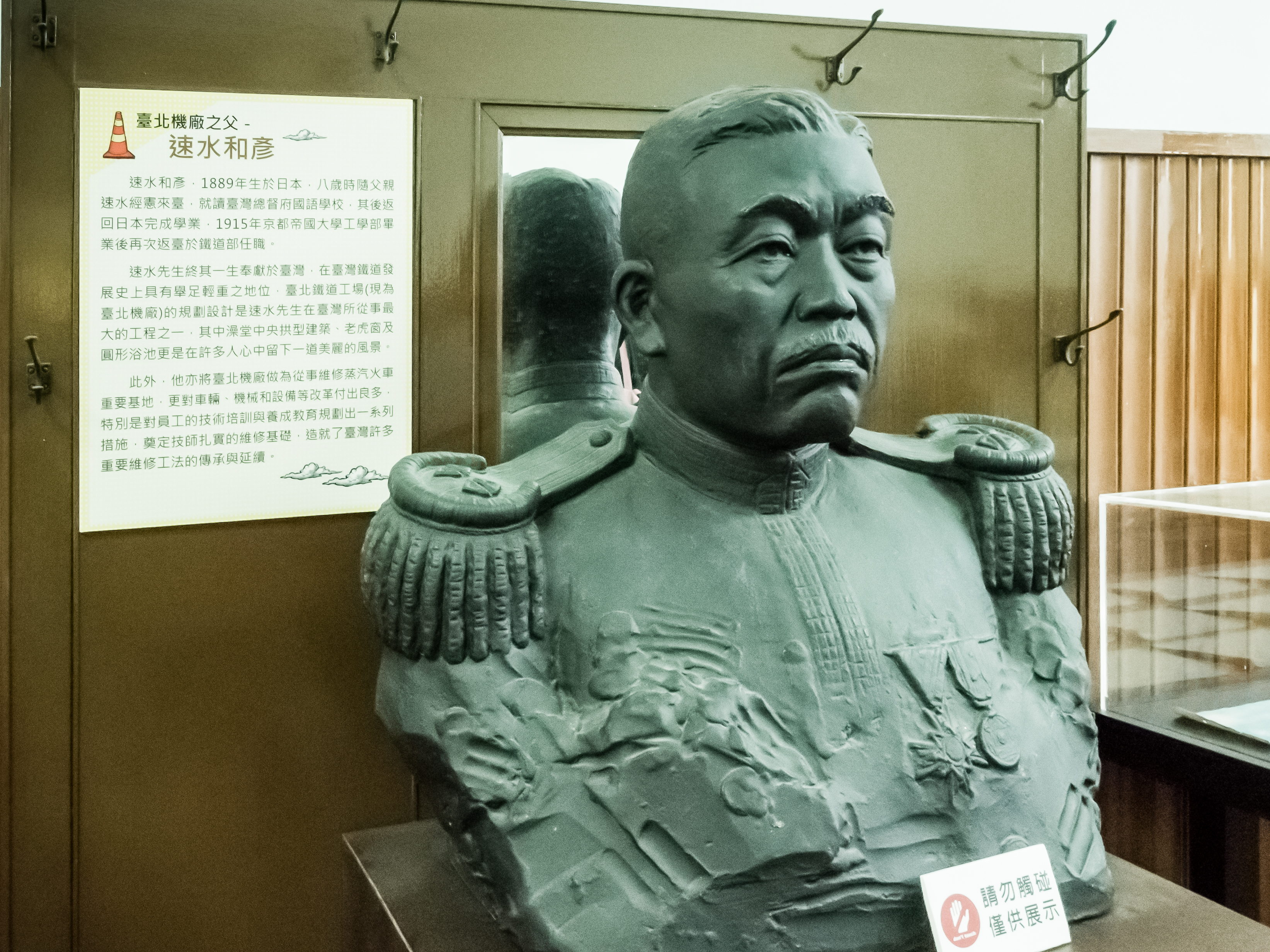 「北廠之父」速水和彦的胸像